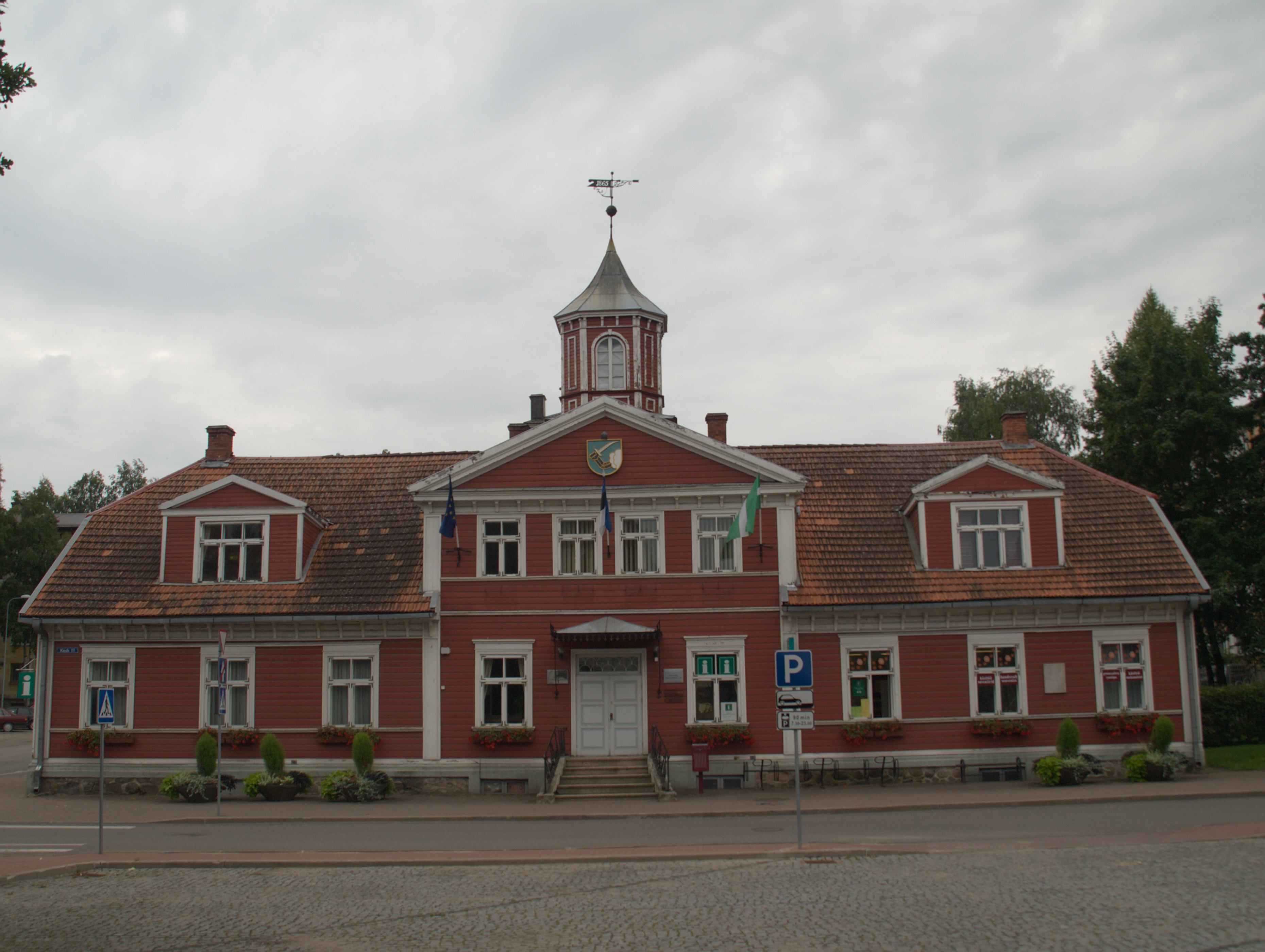 Valga Raekoda